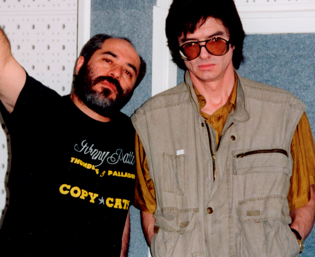 Руководство СПМ «Рекорд»